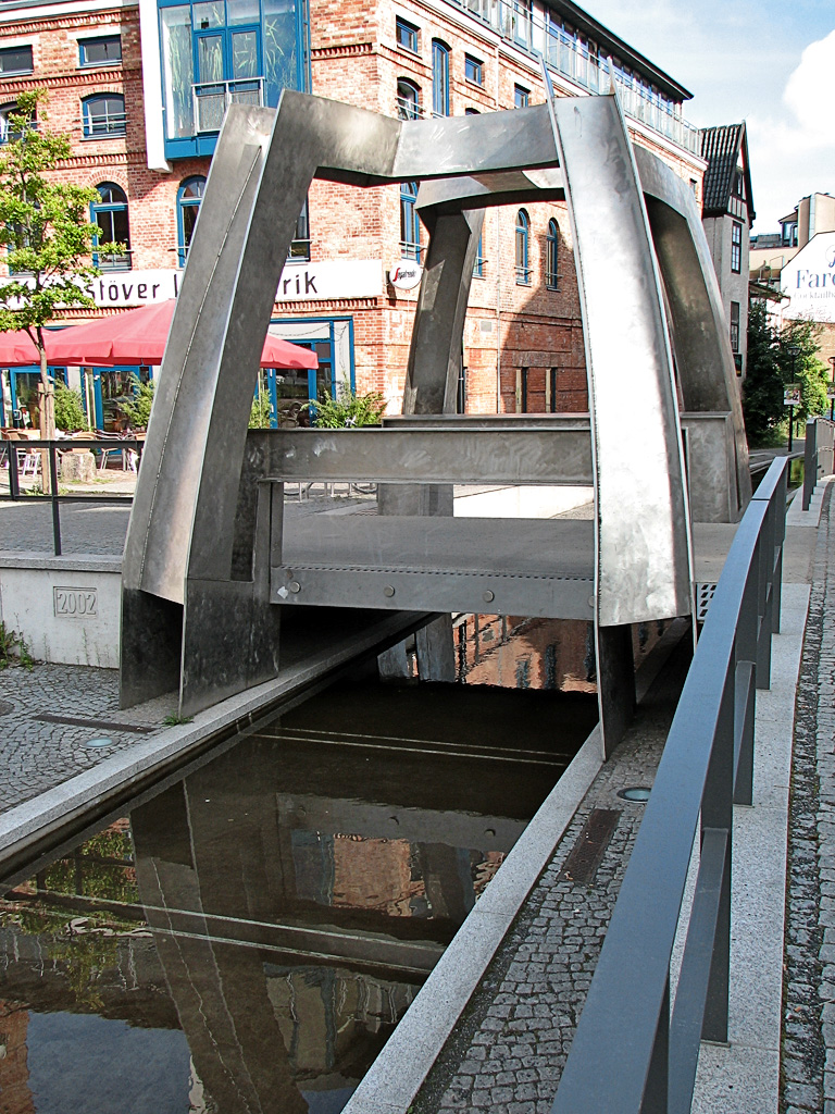 Beschreibung: Viergelindebrücke in Rostock (2002 erbaut) / Frontseite / Germany Fotograf: Darkone, 17. August 2005